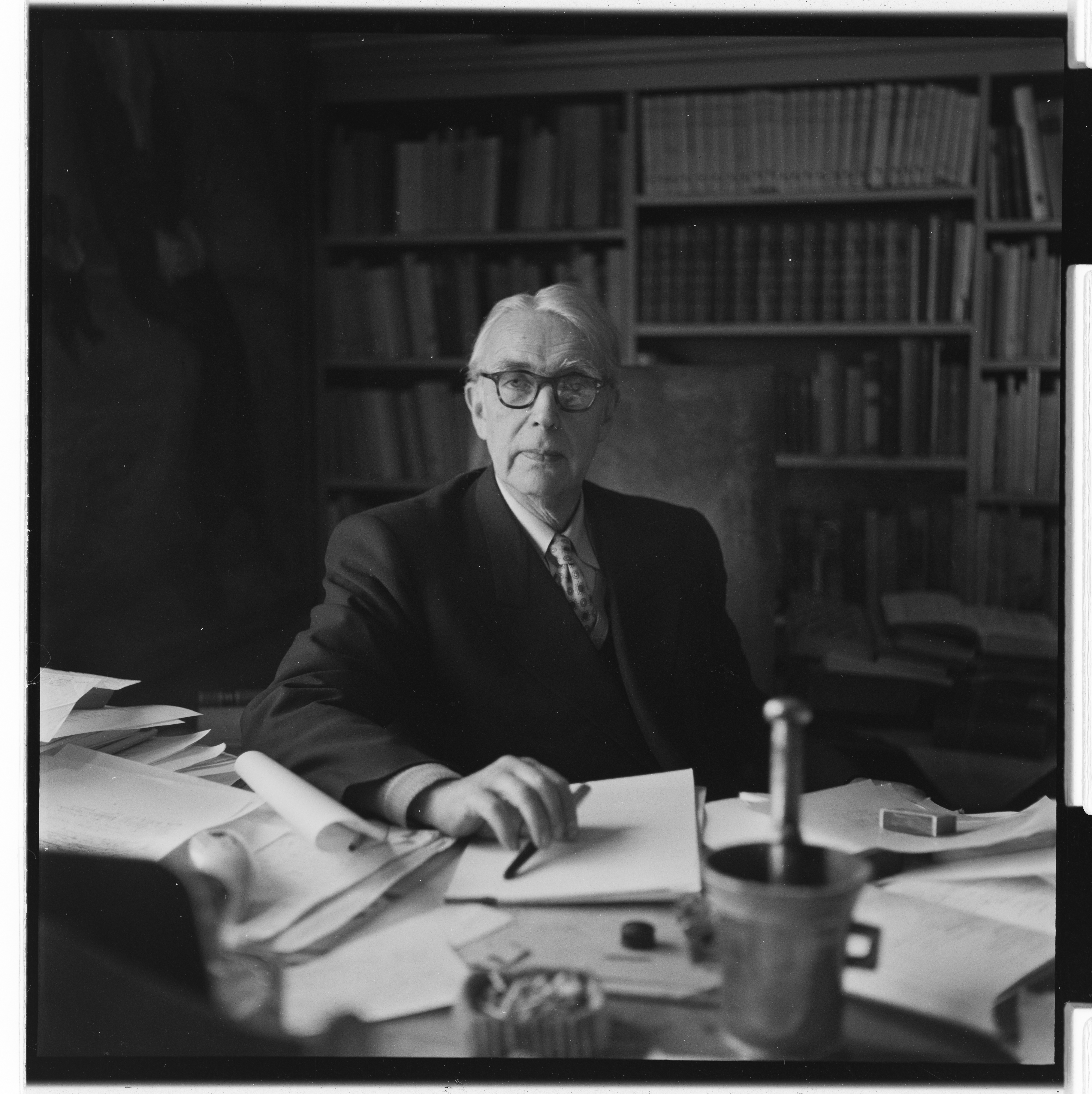 Bildet er hentet fra Arkivverket. Herman Wildenvey med frue. Trykkoker. NÅ nr. 19, 1955 Arkivinstitusjon : Riksarkivet Arkivnavn : Billedbladet NÅ Sted : Norge, Vestfold, Larvik, Hergisheim Emneord: Menn, Portretter Avbildet: Wildenvey, Herman